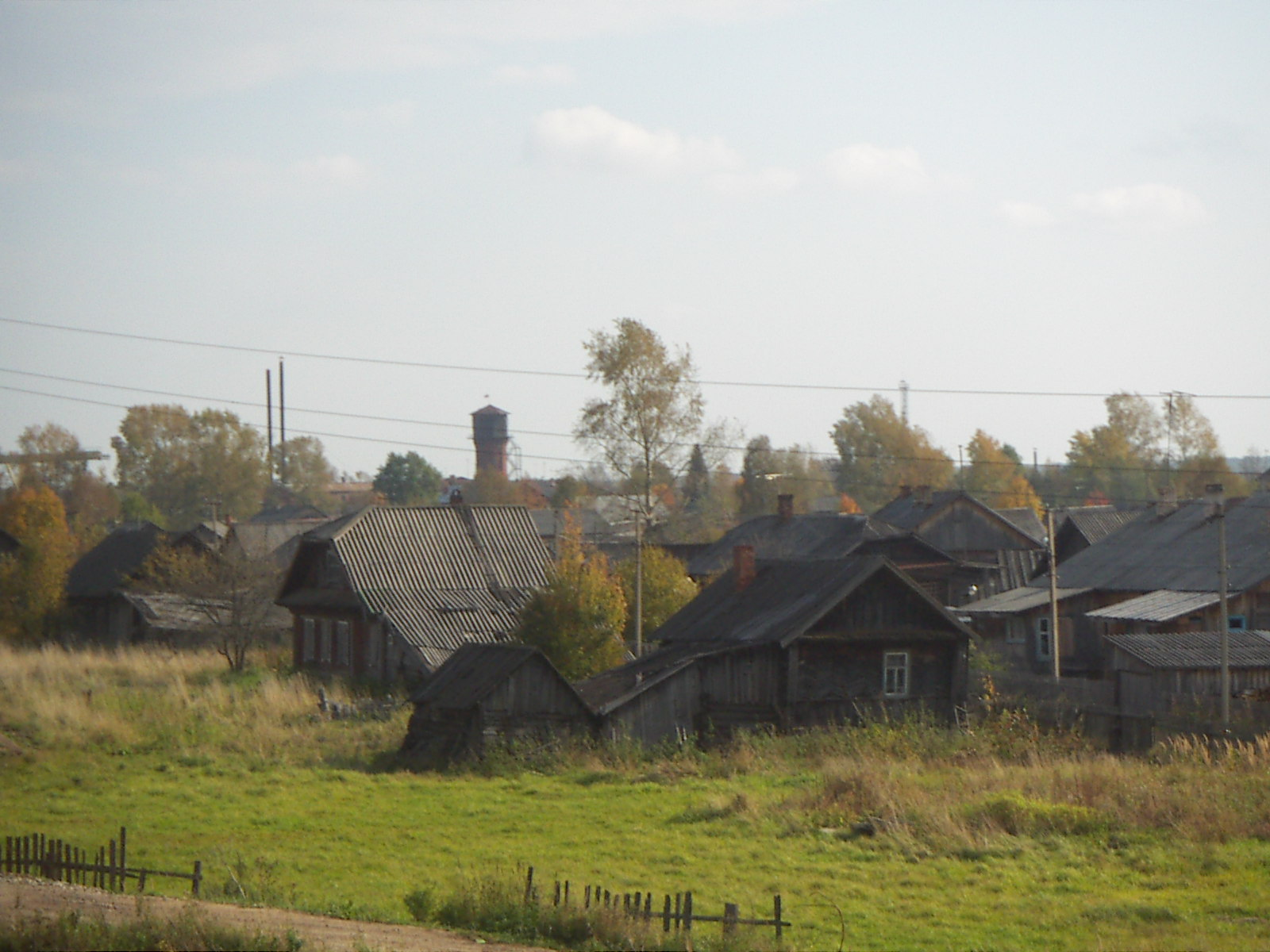 Near Berezovka